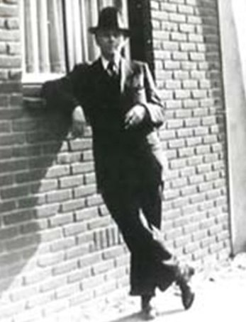 Herman Hubertus Joannes Maas, 1877-1958. Limburgs onderwijzer, schrijver en journalist